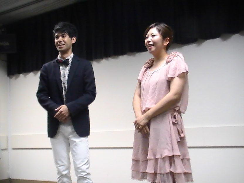 ハナイチゴ (お笑いコンビ 2016年5月)